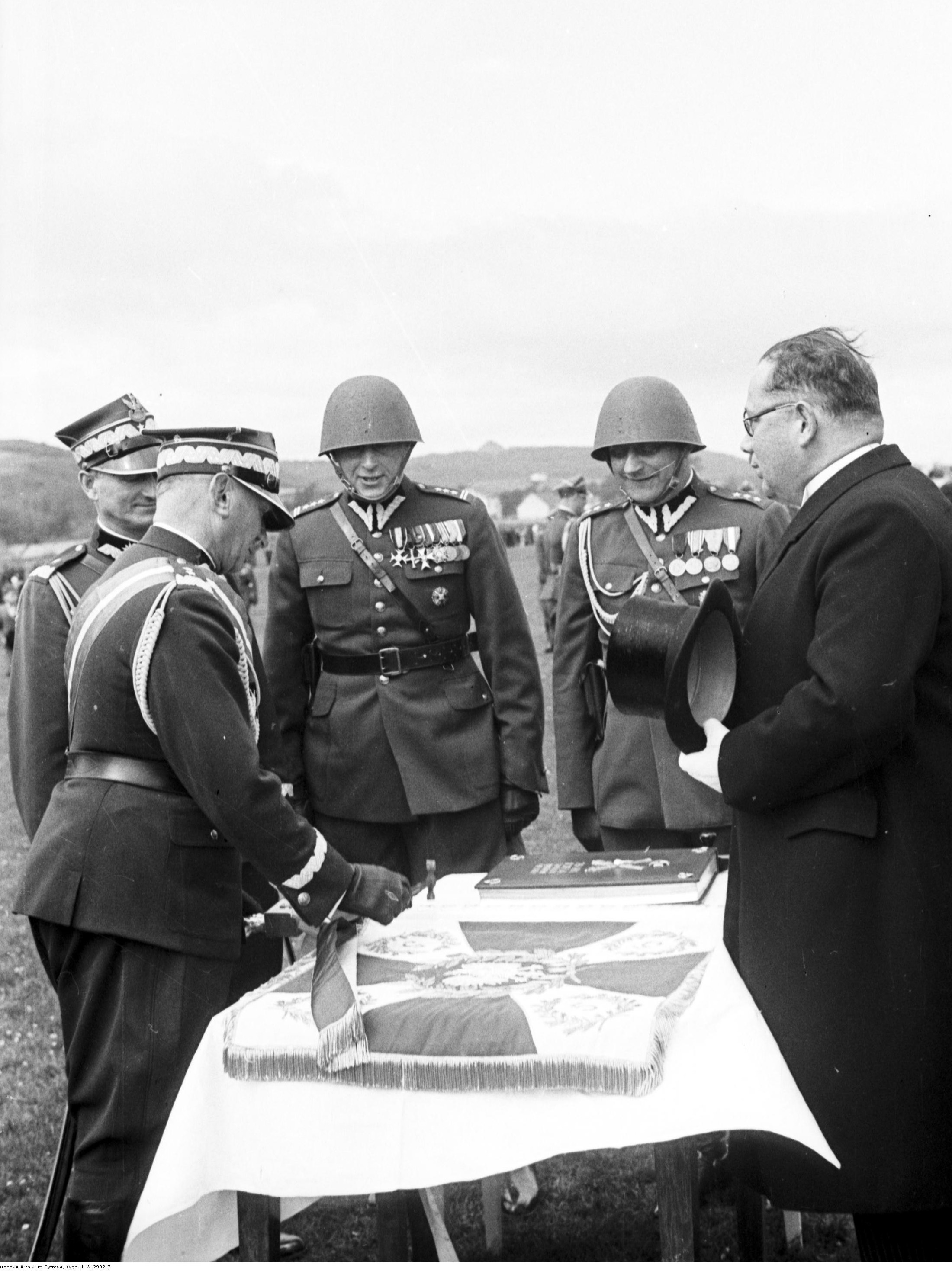 Wręczenie i poświęcenie sztandarów pułkom artylerii na Krakowskich Błoniach. Inspektor Armii gen. dyw. Juliusz Rómmel w towarzystwie dowódcy OK V gen. bryg. Jerzego Aleksandra Narbutt-Łuczyńskiego wbija pamiątkowy gwóźdź w drzewce sztandaru 5 Pułku Artylerii Ciężkiej. Obok widoczna księga pamiątkowa. Koncern Ilustrowany Kurier Codzienny - Archiwum Ilustracji. Sygnatura: 1-W-2992-7